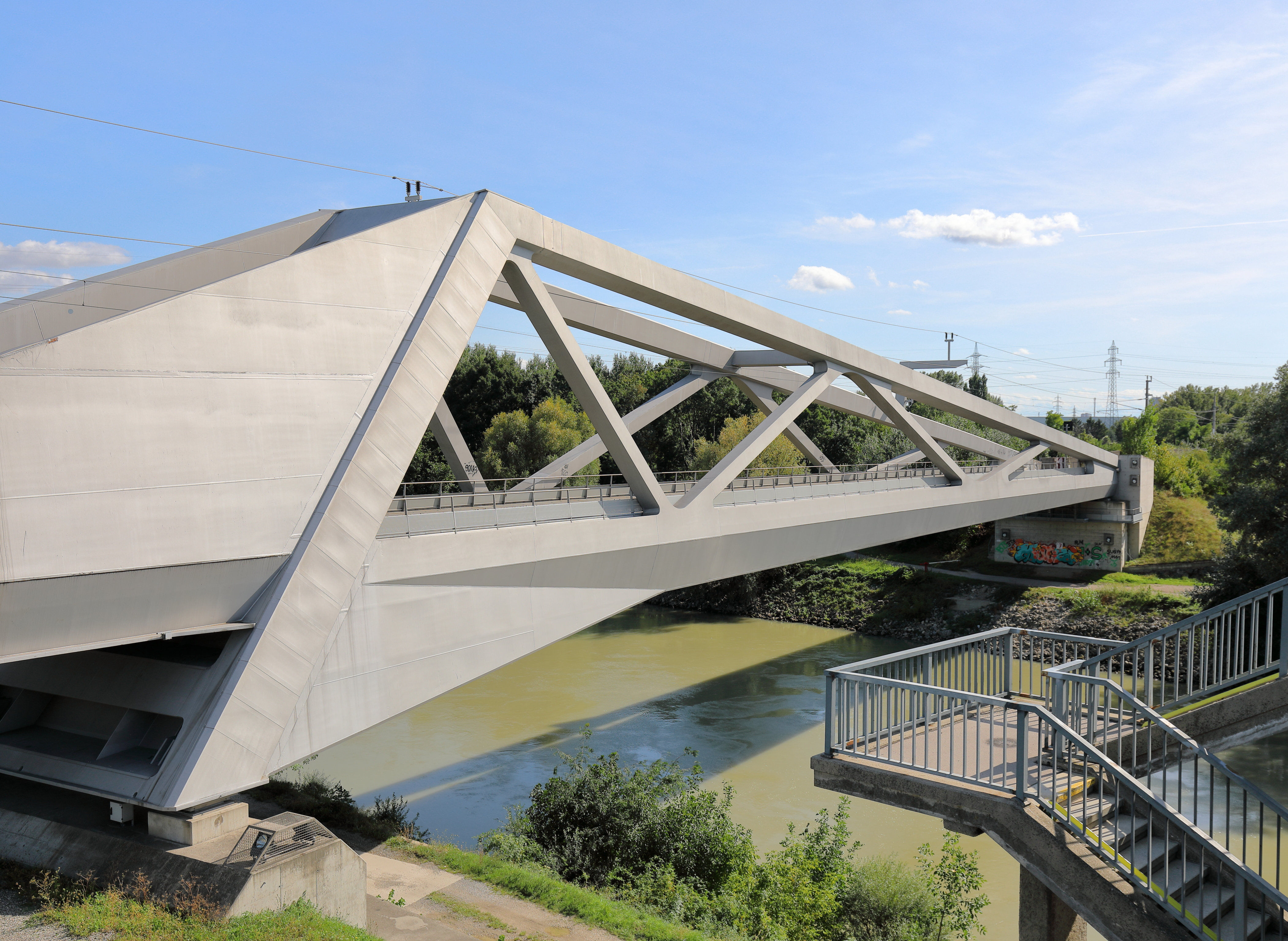 Der südliche Teil bzw. die Donaukanal-Querung der eingleisigen Winterhafenbrücke nächst dem Hafen Freudenau (ehemals als Winterhafen bezeichnet) im 2. Wiener Gemeindebezirk Leopoldstadt.Die ursprüngliche Eisenbahnbrücke wurde Ende des II. Weltkrieges gesprengt und nicht mehr aufgebaut. Nach dem Bau eines Containerterminals neben dem Hafen, wurde die Verbindung zwischen der Donauuferbahn und der Donauländebahn wieder hergestellt und dazu die Brücke als das zentrale Bindeglied errichtet. Der Spatenstich für die 172 m lange Brücke erfolgte am 13. Februar 2007 und wurde nach einem Entwurf des Architekten Albert Wimmer gebaut. Sie ist eine asymmetrische Stahlbrücke, die mit dynamischer Linienführung aus einem Fachwerk über den Donaukanal und einer Trogbrücke über die Hafen-Einfahrt besteht.